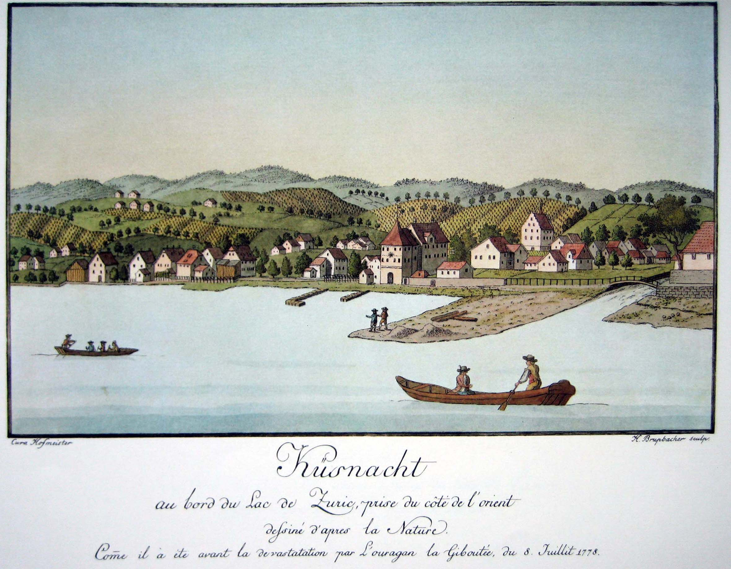 Küsnacht 1794